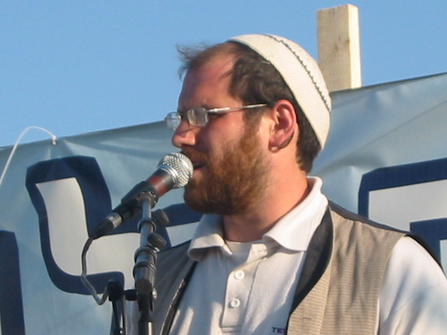 Aharon Razel in Migron